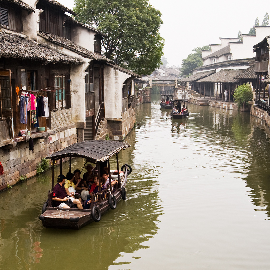 General view of Wuzhen, China. Vue d'ensemble de Wuzhen, Chine.